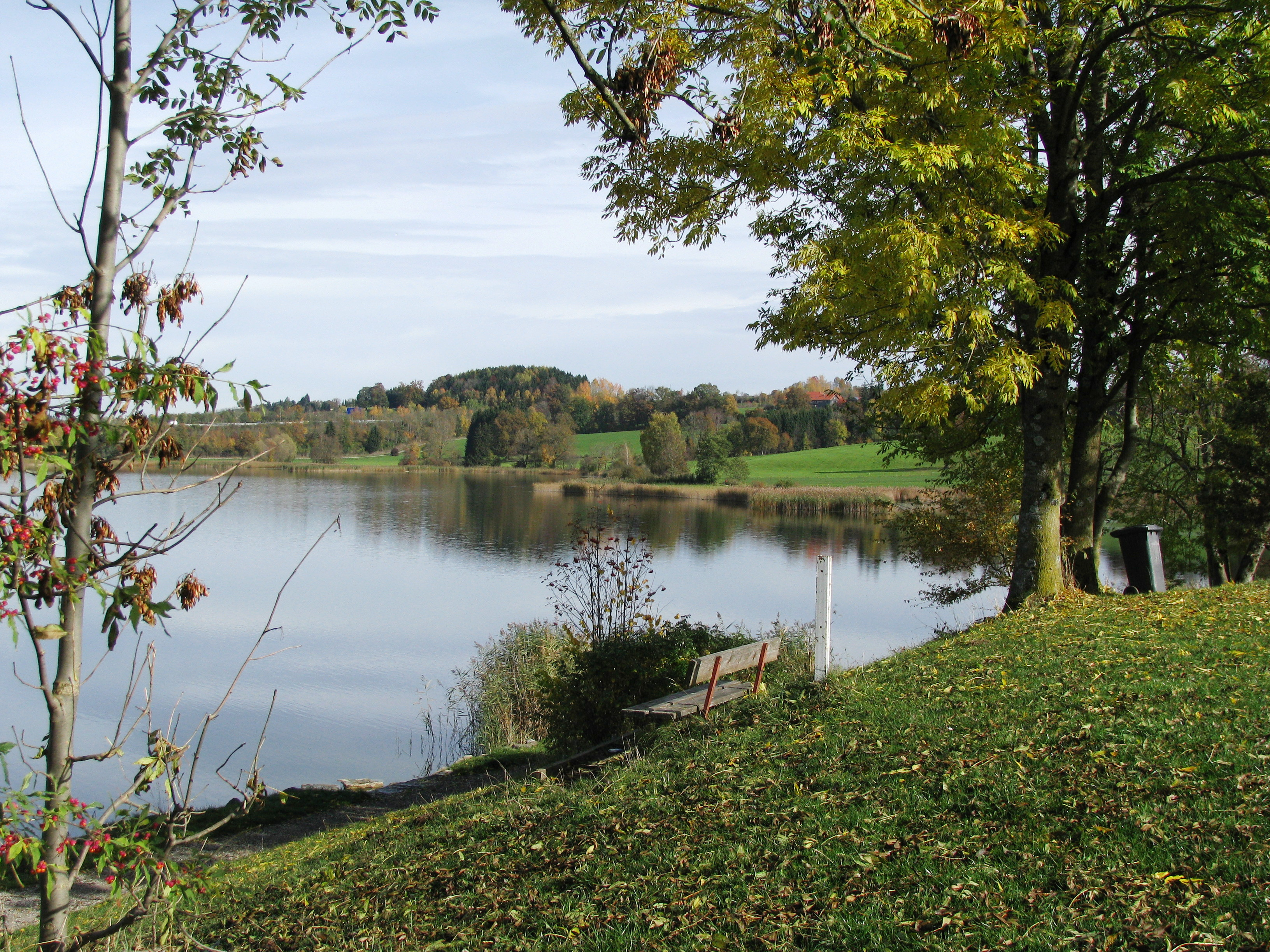 Sulzberger See nach Nordosten